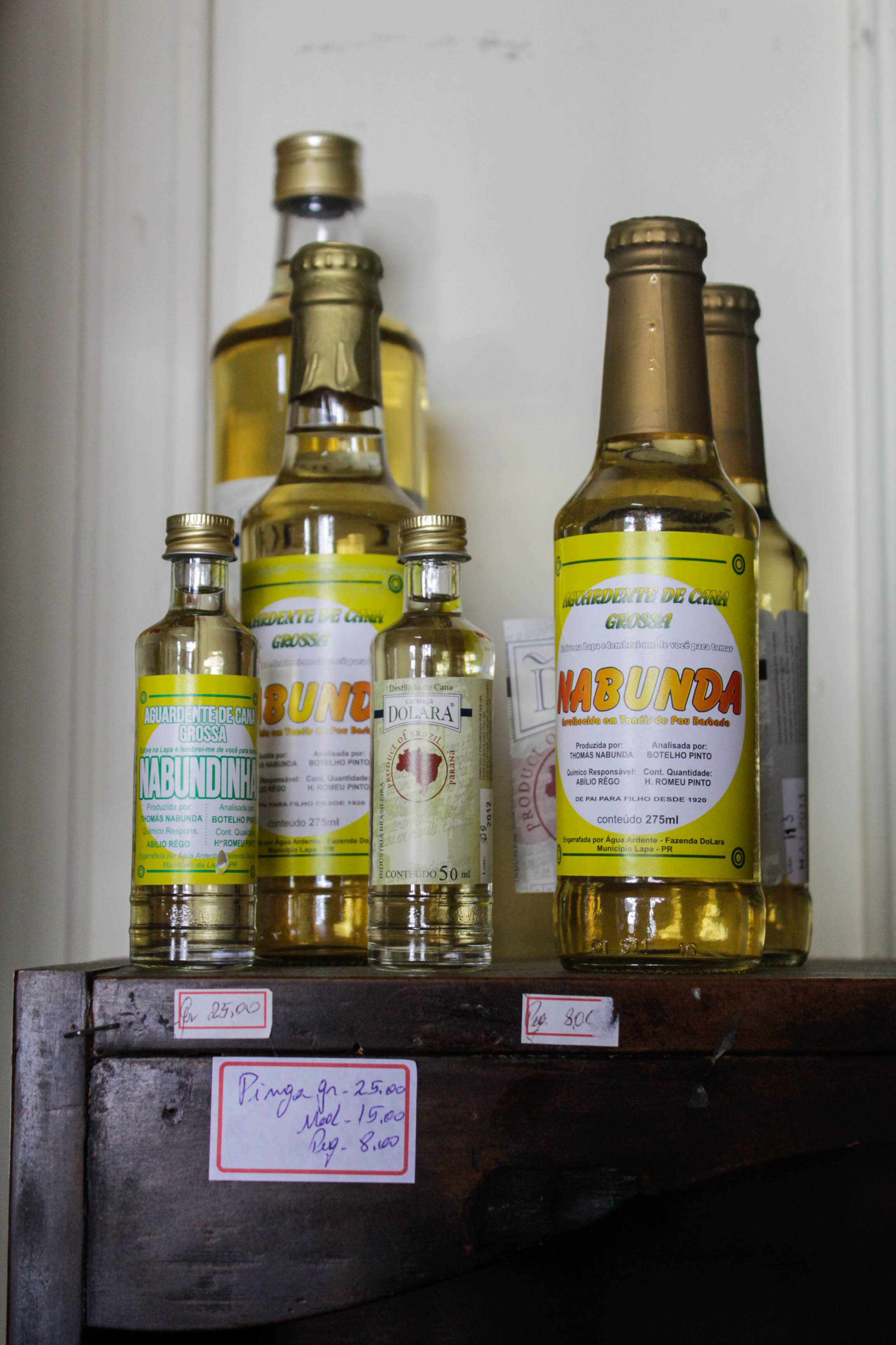 Lapa, PR: conjunto arquitetônico e paisagístico